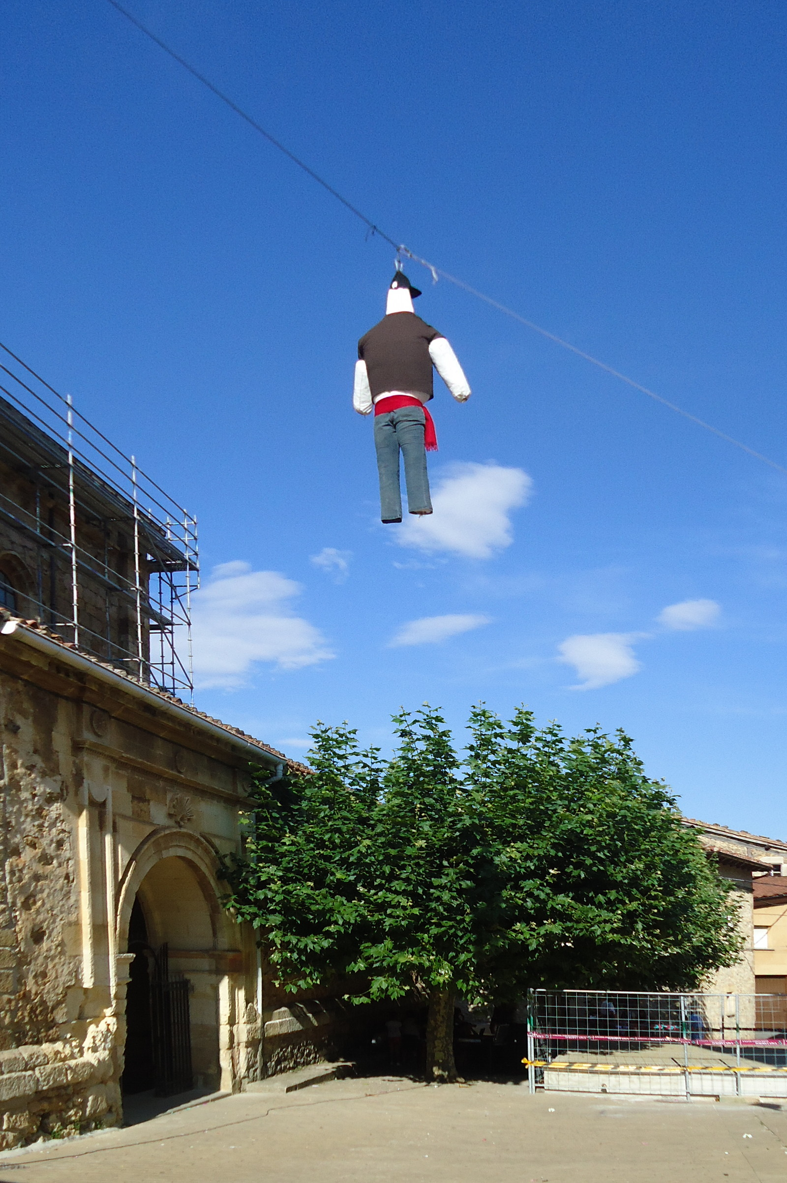 Bernedoko (Araba) jaietako panpina